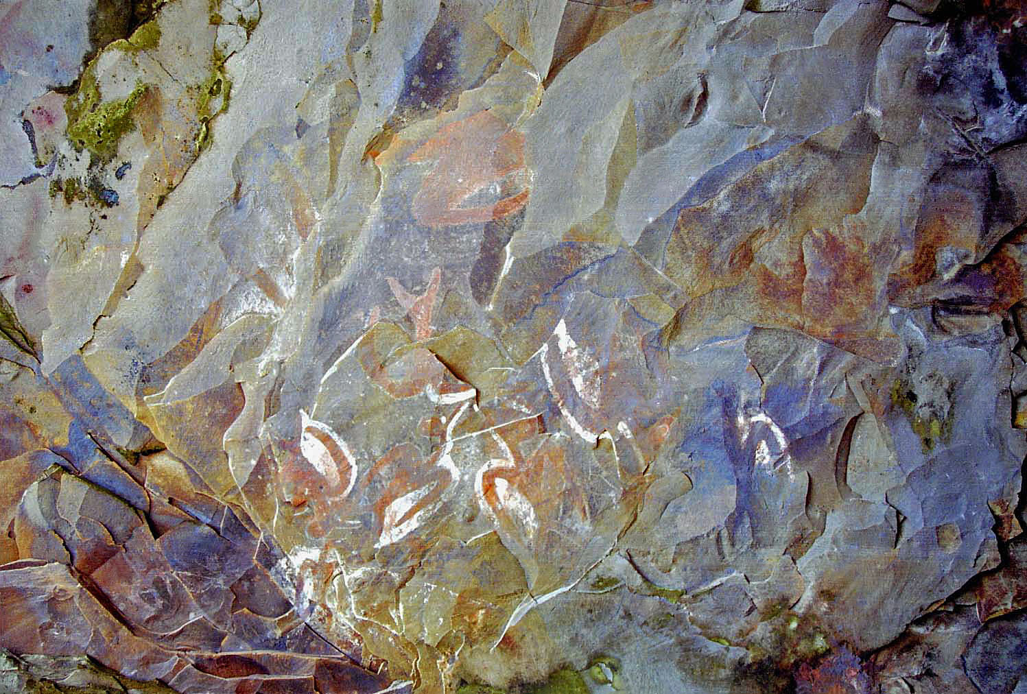 Ana Kai Tangata - Easter Island